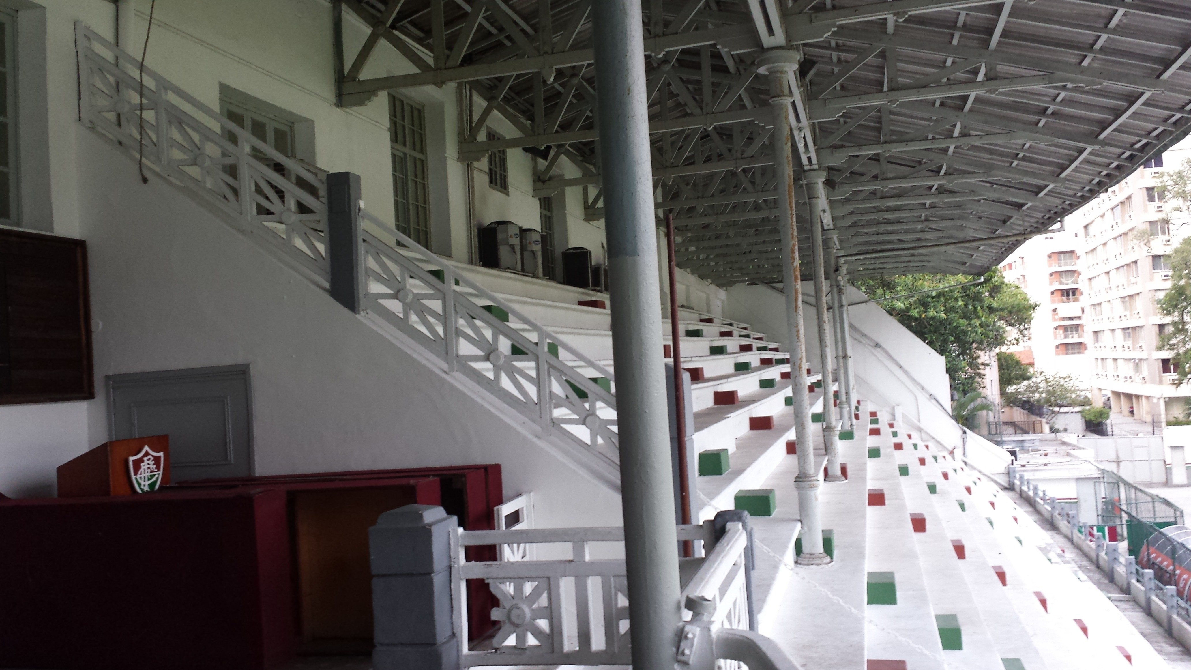 Tribuna Social vista da Tribuna de Honra do Estádio de Laranjeiras, do Fluminense Football Club.